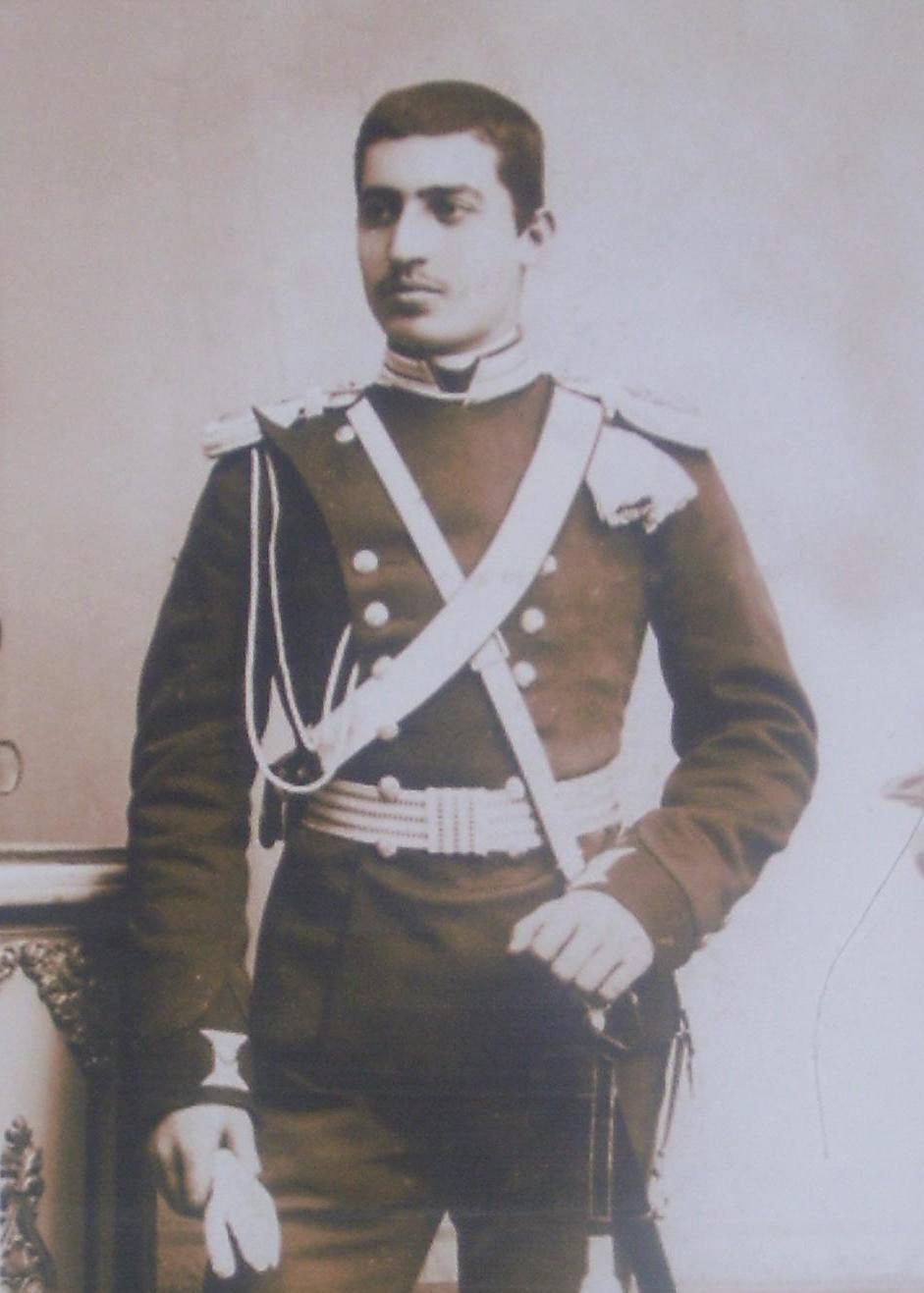 Поручик Петър Дървингов